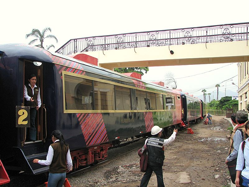 Salida del tren Lima - Huancayo desde la estación de Desamparados de Lima.